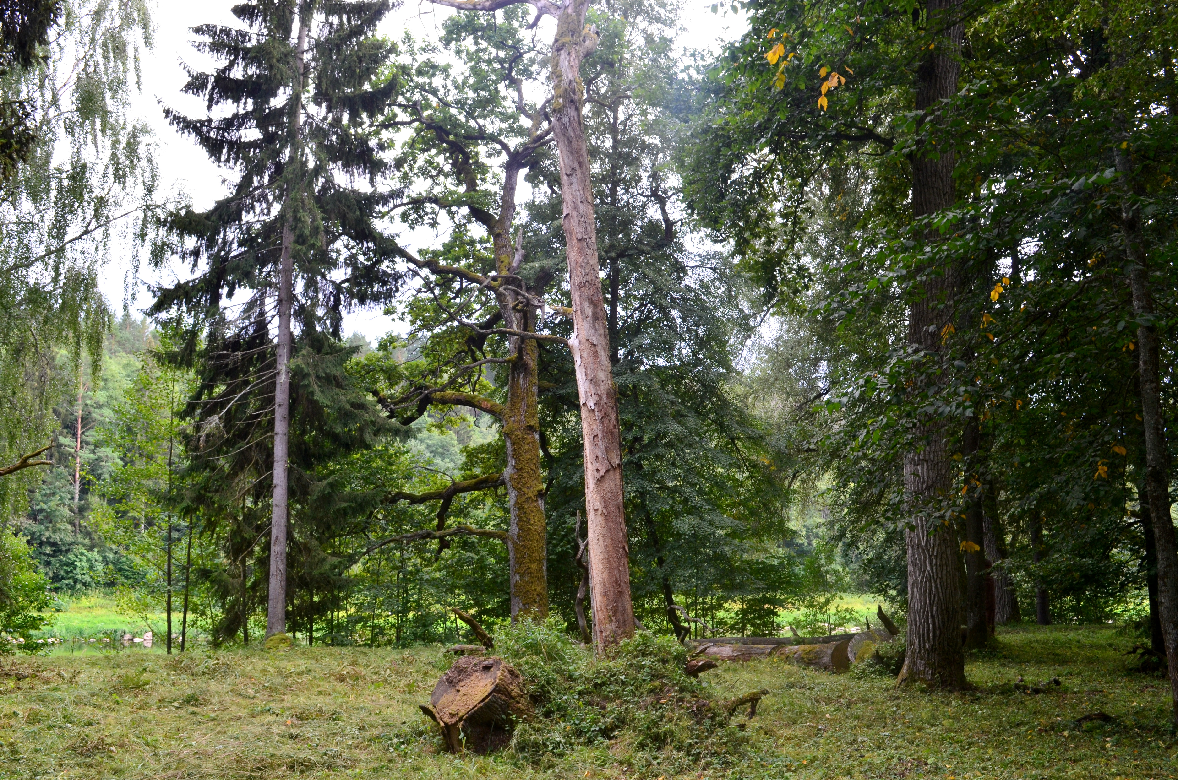 Punios šilas, Alytaus raj.